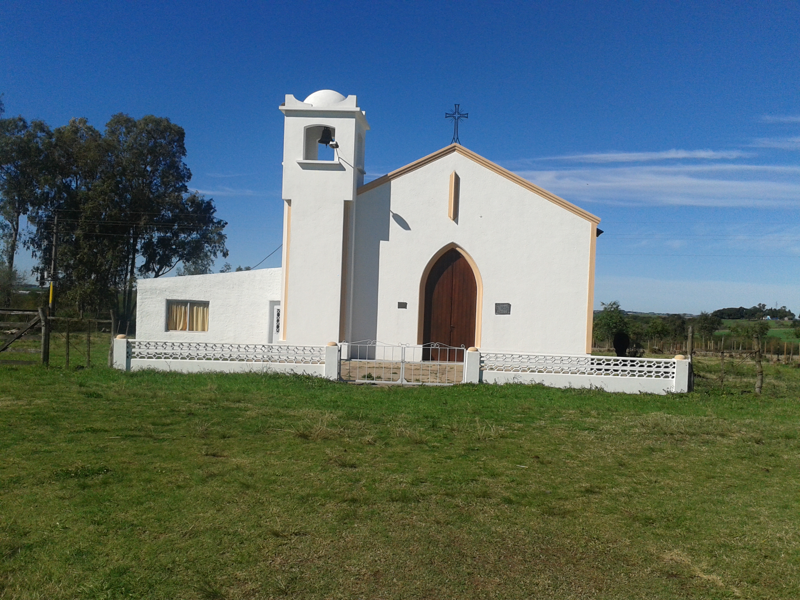 Capilla del pueblo